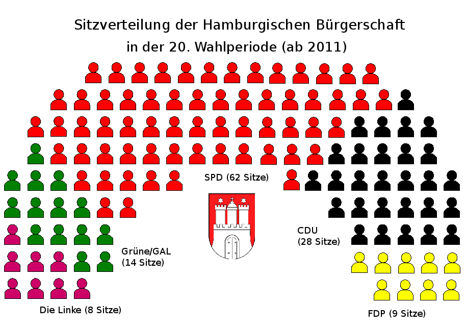 Sitzverteilung der Hamburgischen Bürgerschaft in der 20. Wahlperiode (ab 2011)